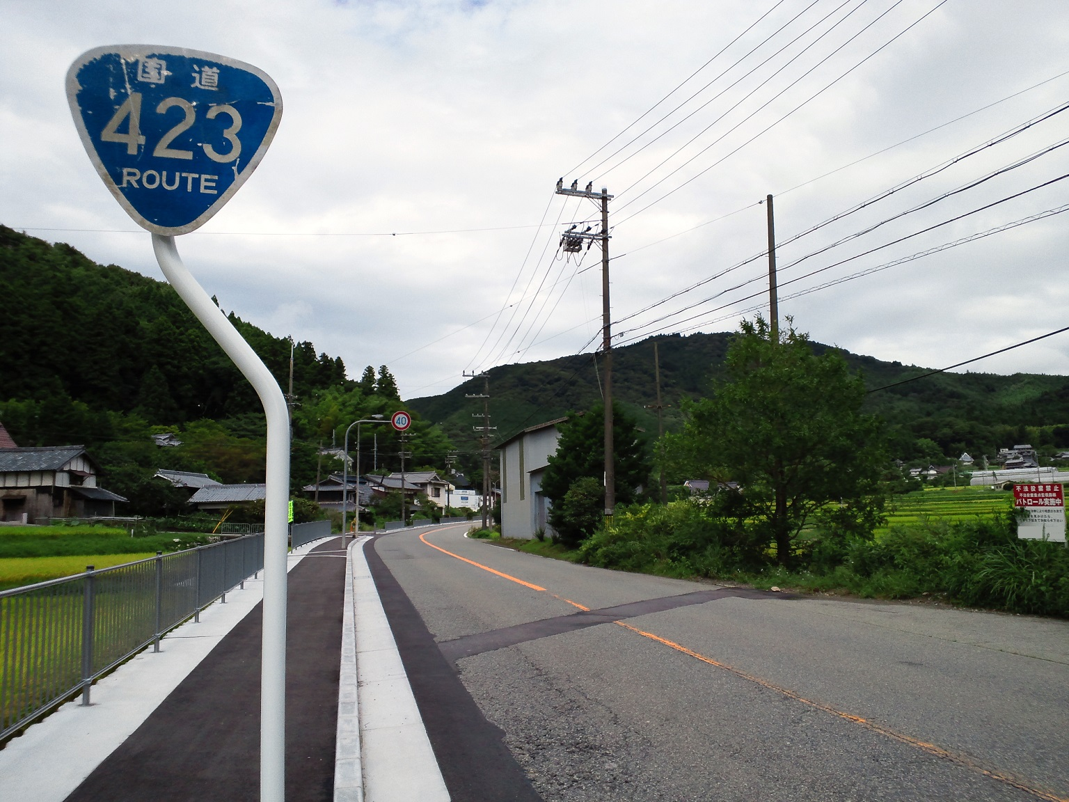 豊能郡豊能町牧付近の国道423号。